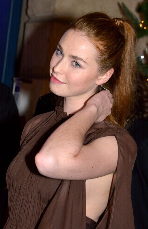 Freya Mavor au dîner des révélations des César du cinéma